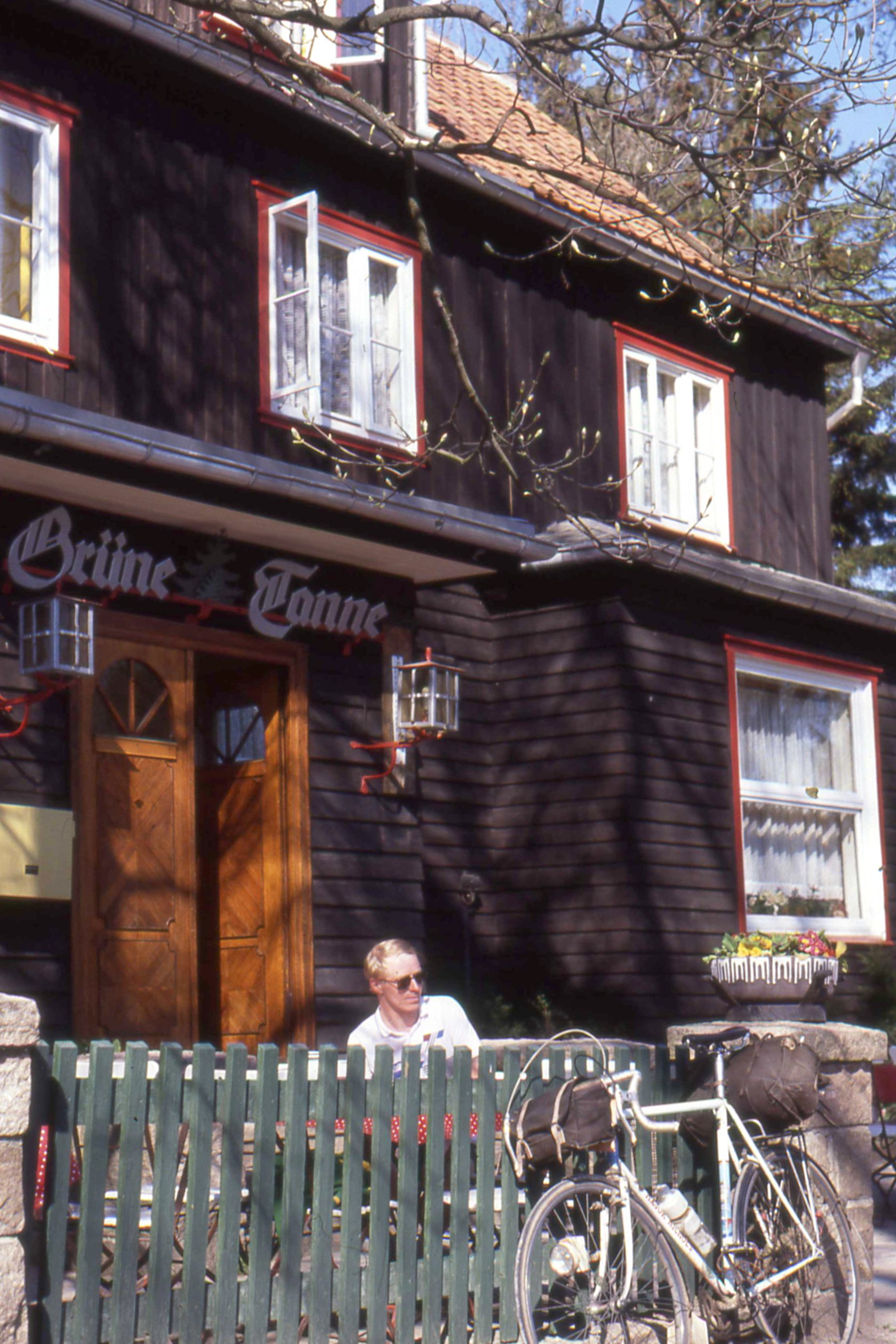 Gasthof Grüne Tanne, Mandelholz